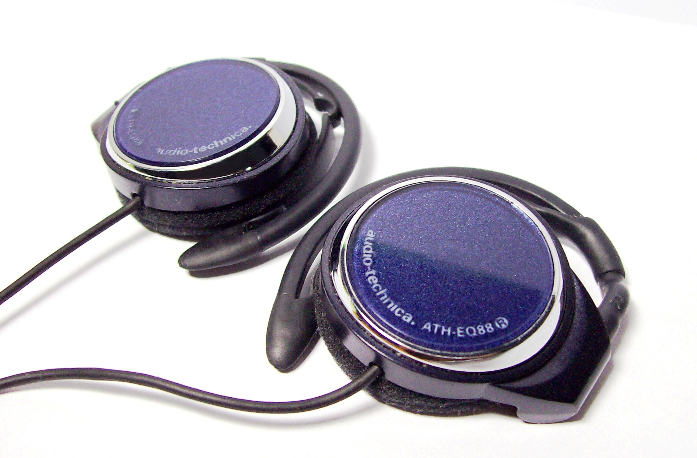 铁三角（audio-technica）贴耳式耳机（耳挂）